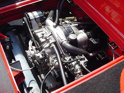 NSU Spider Motorraum